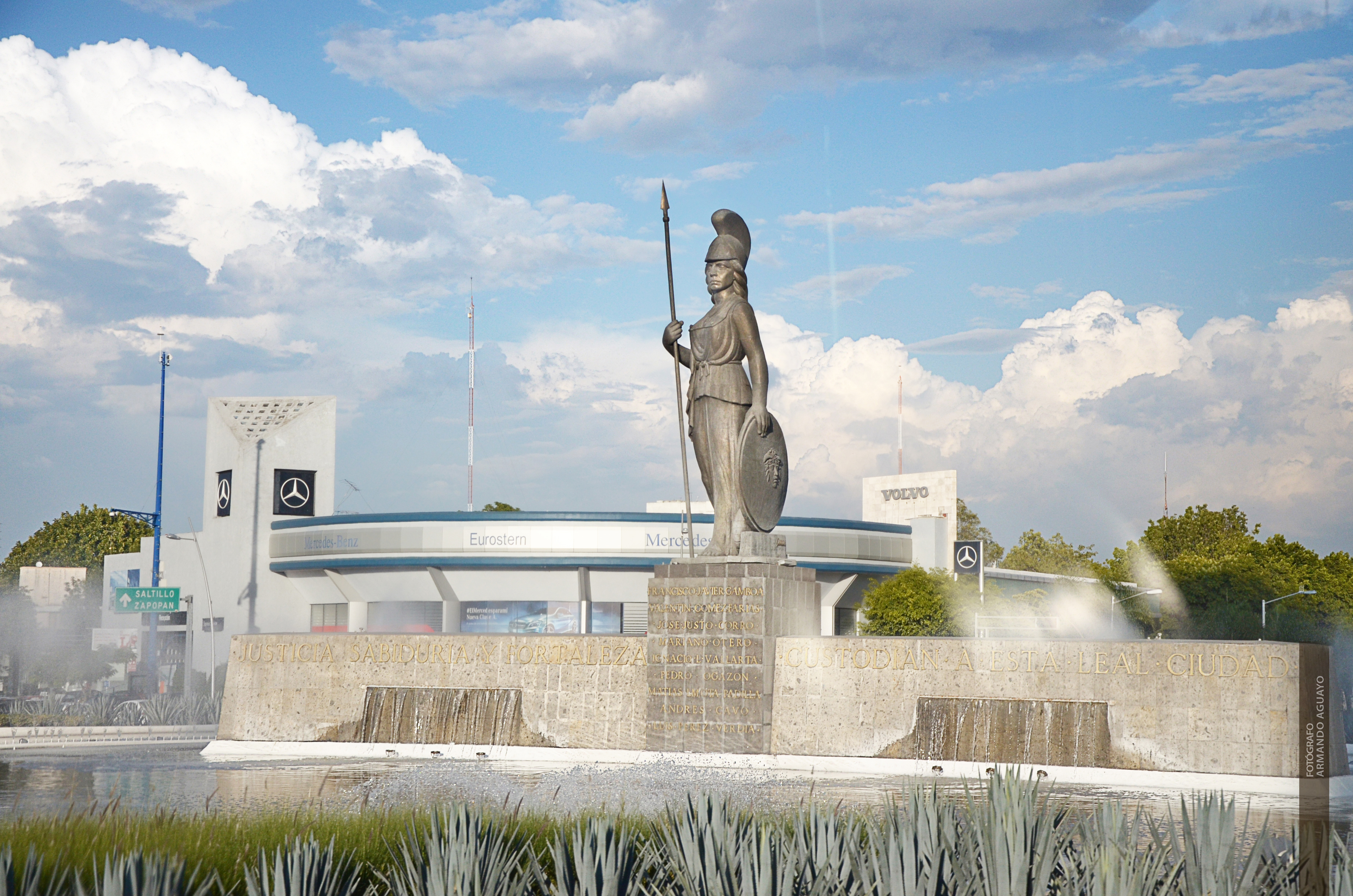 La Minerva, es un monumento representativo de la Ciudad de Guadalajara, en el estado de Jalisco, México y la fuente más grande de dicha ciudad. La fuente esta adornada con una estatua de la diosa romana Minerva (Atenea en la cultura Helénica) obra del escultor Joaquín Arias. La obra se realizó durante el periodo del gobernador Agustín Yáñez, quien encargo el proyecto al Arq. Julio de la Peña.